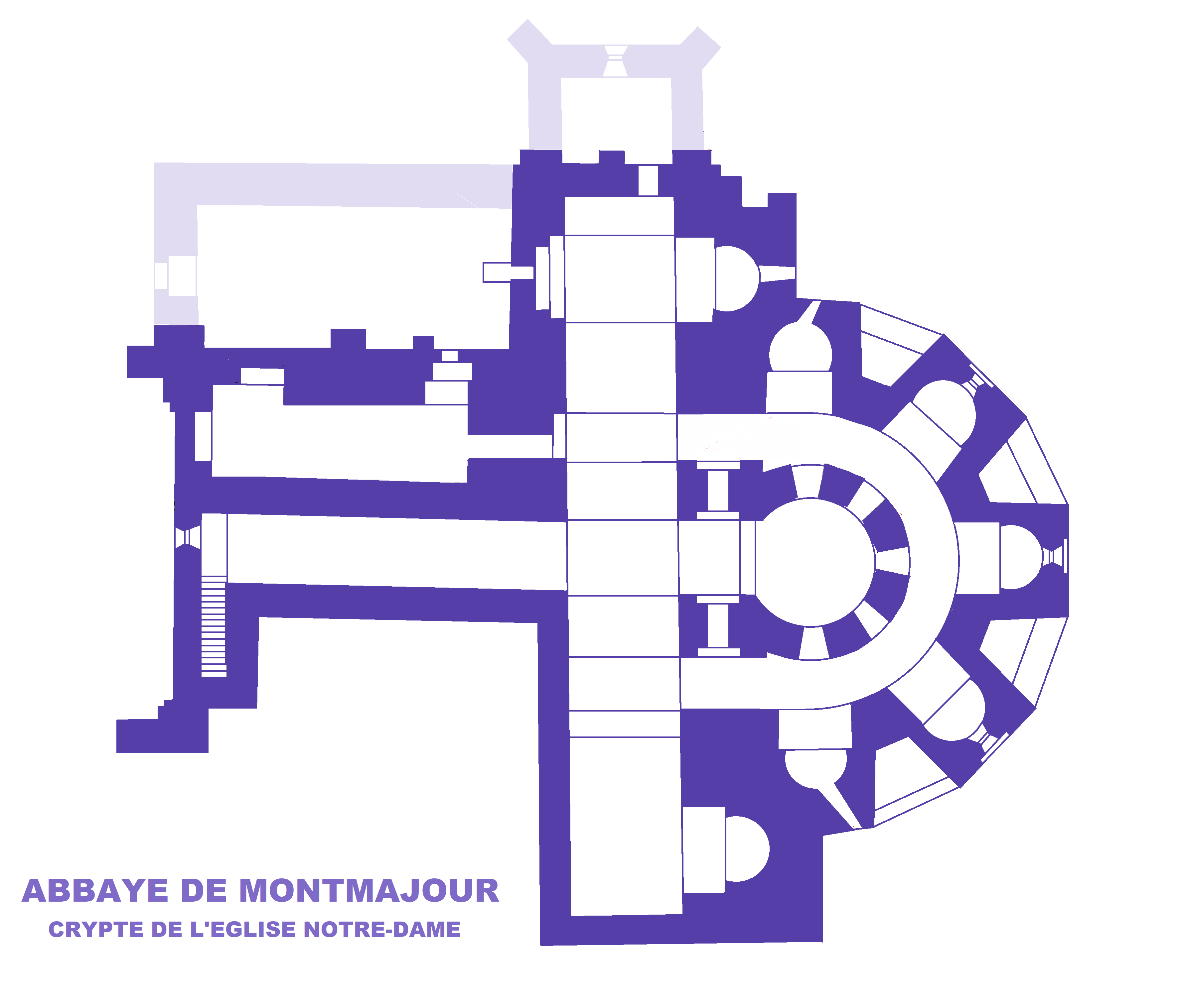 Abbaye de Montmajour, crypte de l'église Notre-Dame, Plan